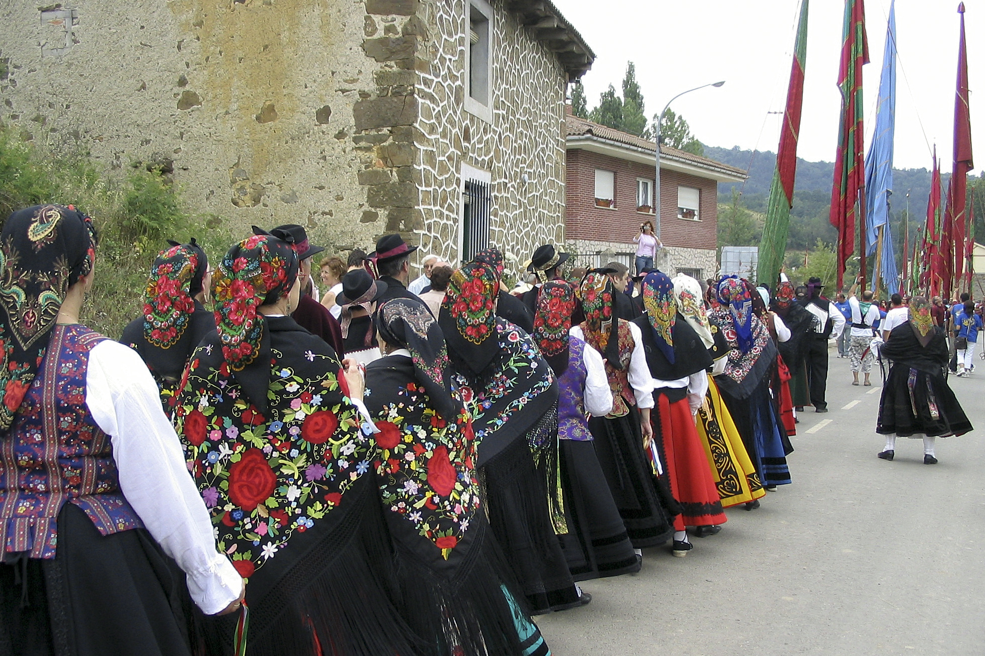 Fiesta de la Trashumancia, Prioro. León, España. Julio 2006. This is a photography of a Folklore festival in Spain (Wikidata id Q23660809).